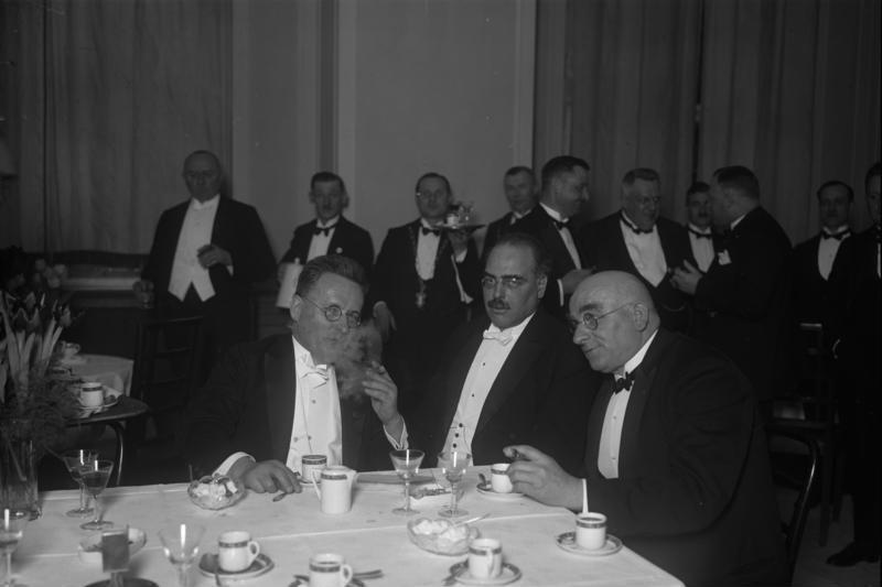 Mitglieder der Reichs-und Staatsbehörden bei dem Empfang des Verbandes der auswärtigen Presse im Schöneberger Rathaus in Berlin! Der Reichstagspräsident Loebe (links) und der Reichsfinanzminister Dr. Hilferding (Mitte) sowie der preussische Ministerpräsident Braun bei dem Empfang.